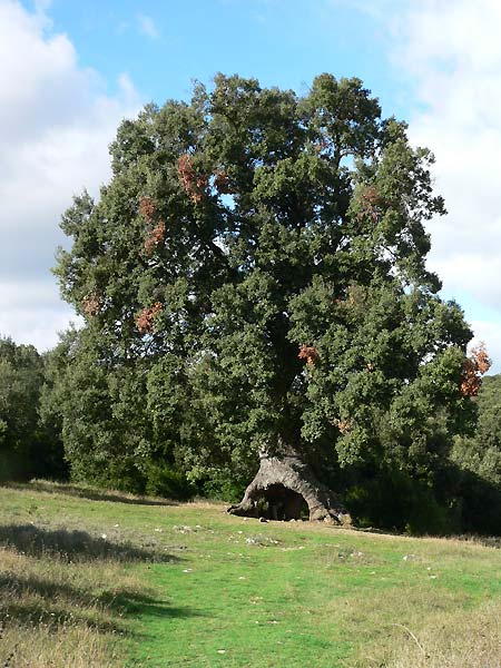 Steineiche, genannt Tres Patas (Drei Beine) in Mendaza (Navarra) Spanien.